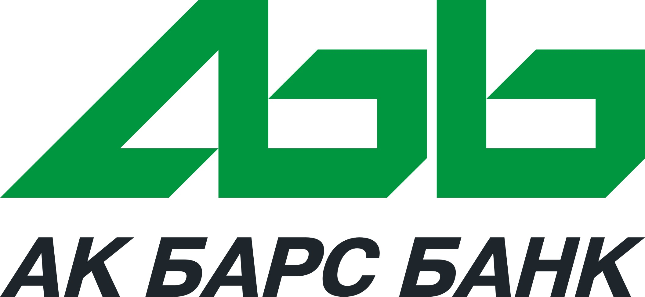 Ак Барс Банк